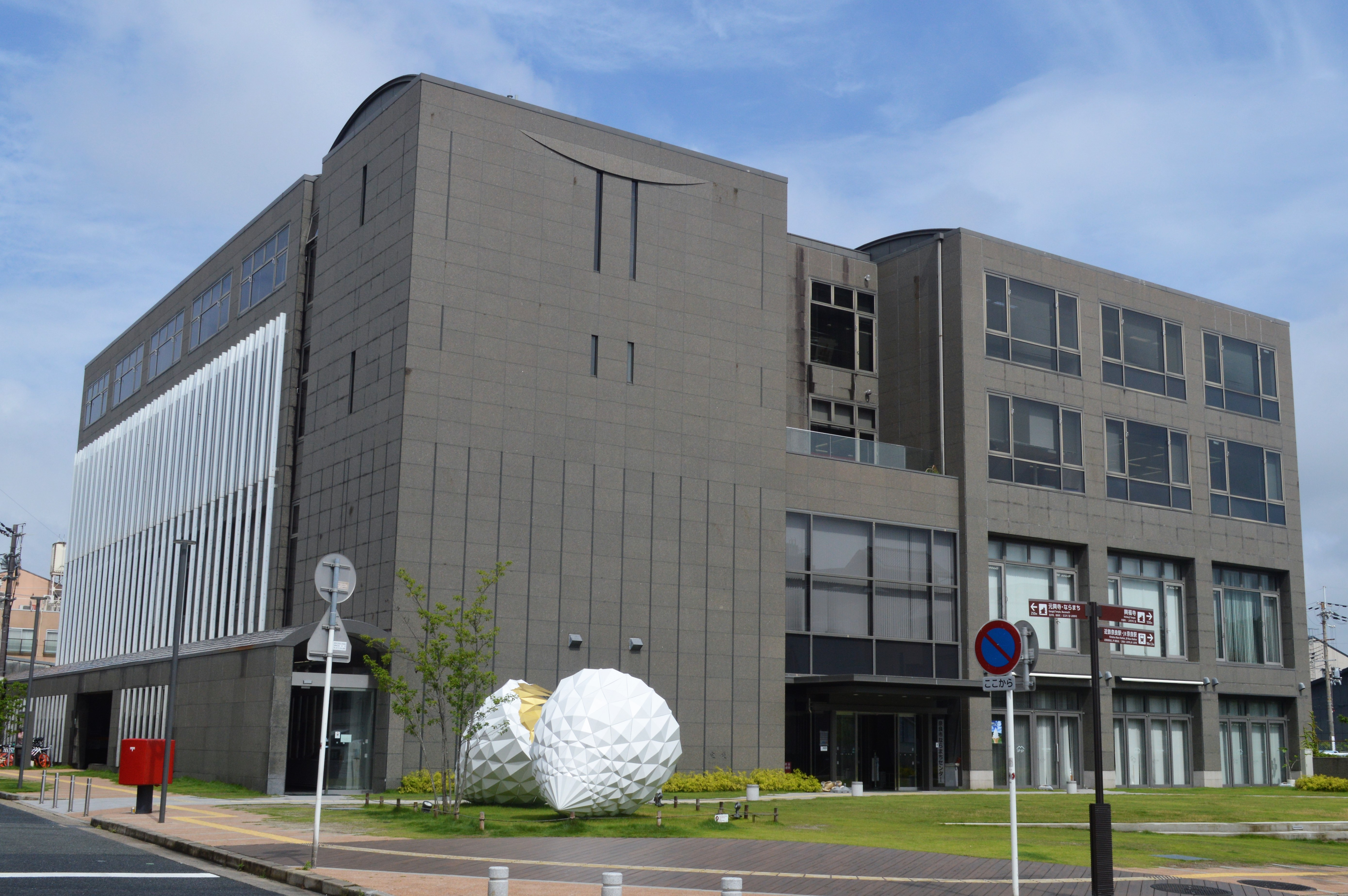 奈良県奈良市のならまちセンター。奈良市立中央図書館が入っている。